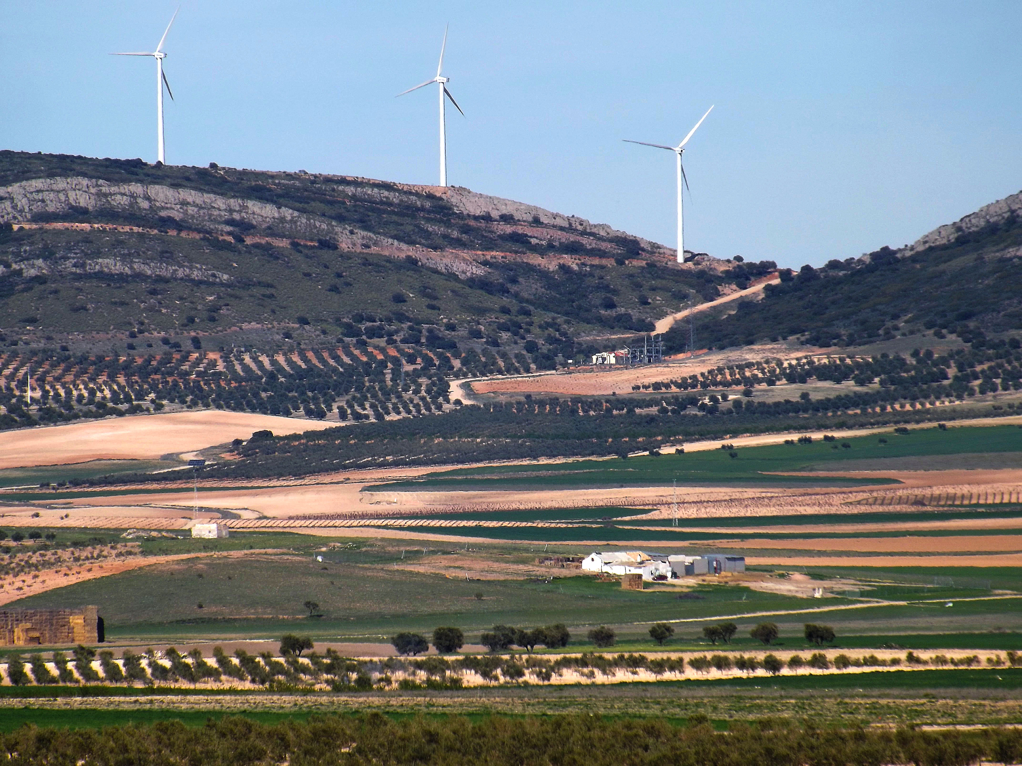 Sierra del Romeral siendo atravesada por la Senda Galiana en Villacañas (Toledo)